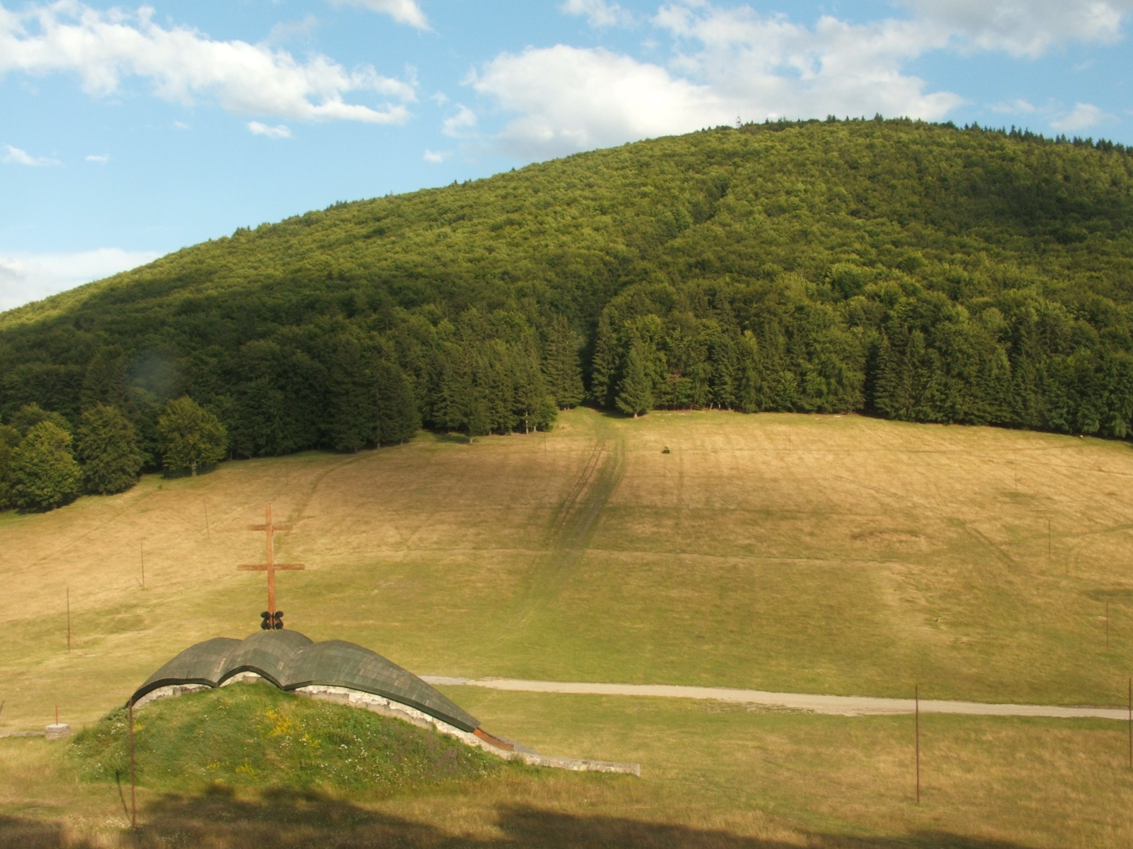 A Kis-Somlyó és a Nagy-Somlyó közötti nyereg, a csíksomlyói búcsú helyszíne